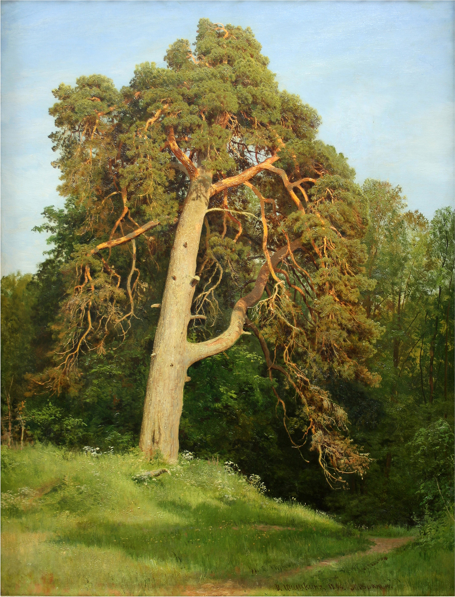 Meriküla mänd